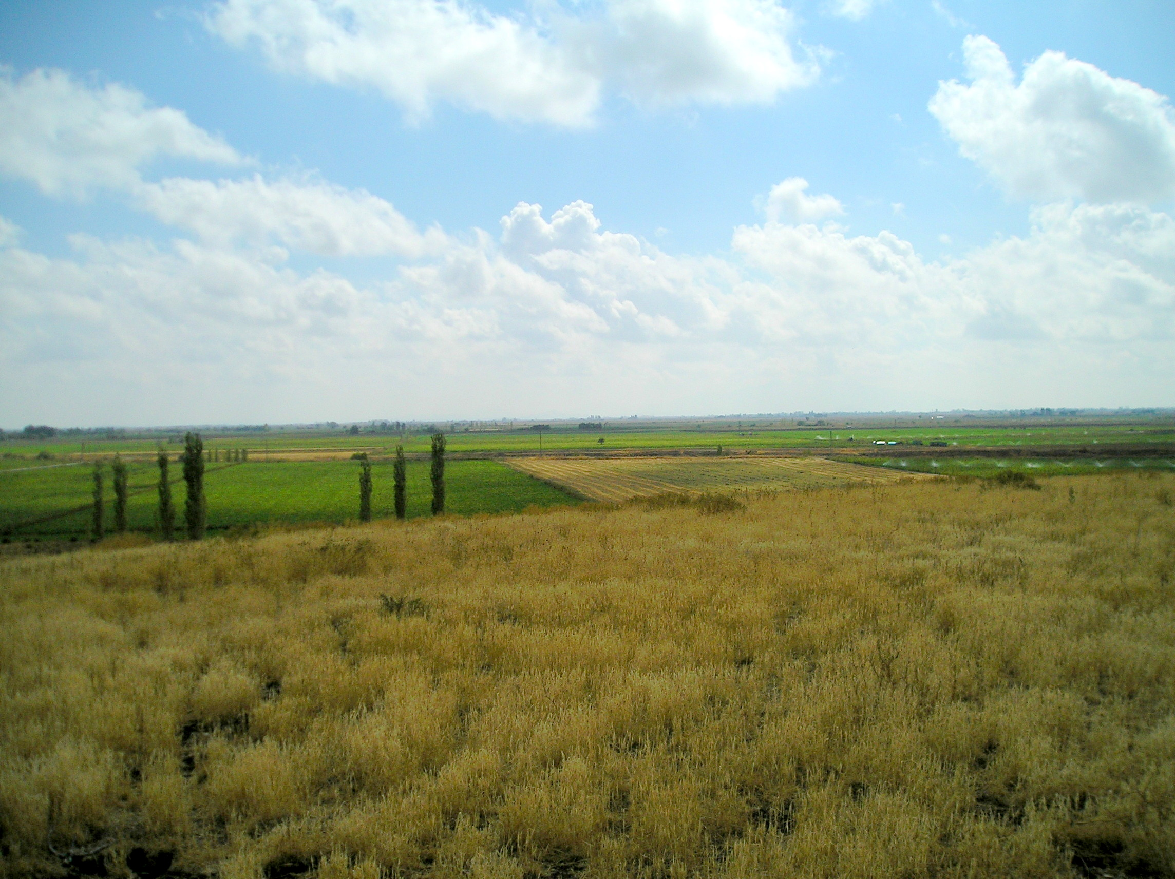 Fields around Çatalhöyük